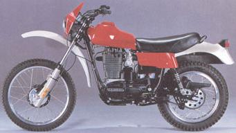 Sanglas 500 TT (Prototyp)